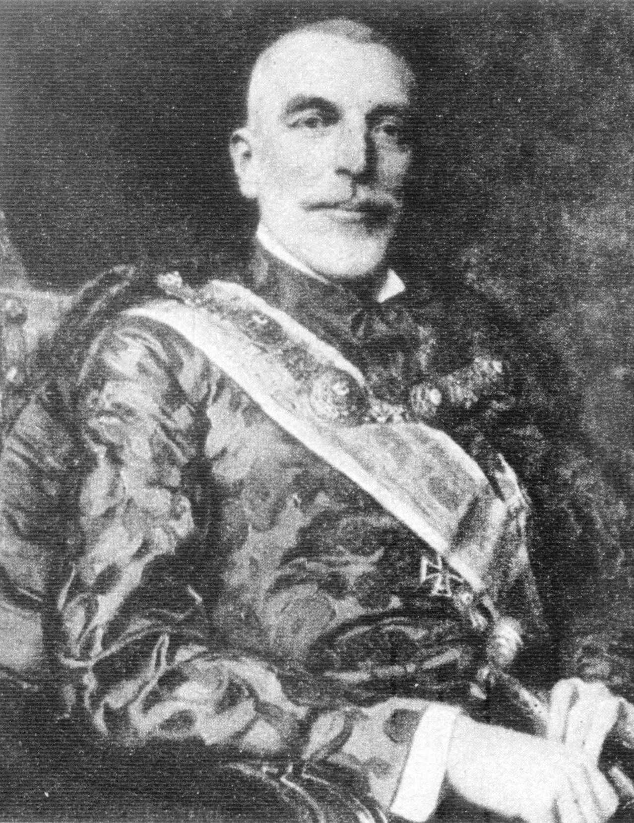 Báró Ghillány Imre földművelődésügyi miniszter. Stettka Gyula festménye